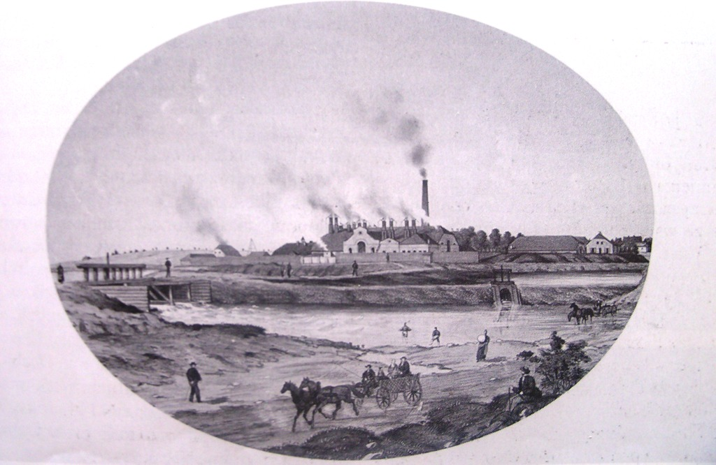 Pudlingarnia Huty Baildon (obecnie w Katowicach), założonej przez Johna Baildona. Litografia z połowy XIX wieku.